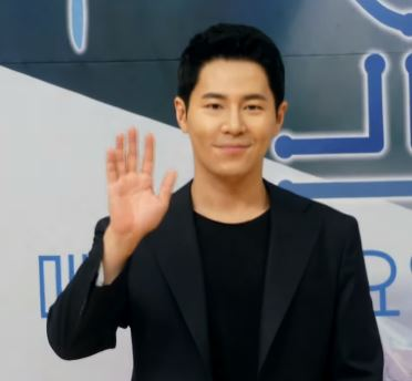 18일 오후 서울시 양천구 목동 SBS에서 SBS 새 금토드라마 '의사 요한' 제작발표회가 열려 배우 지성X이세영X이규형X황희X정민아X김혜은X신동미가 참석해 개별 포토타임을 갖고 있다.